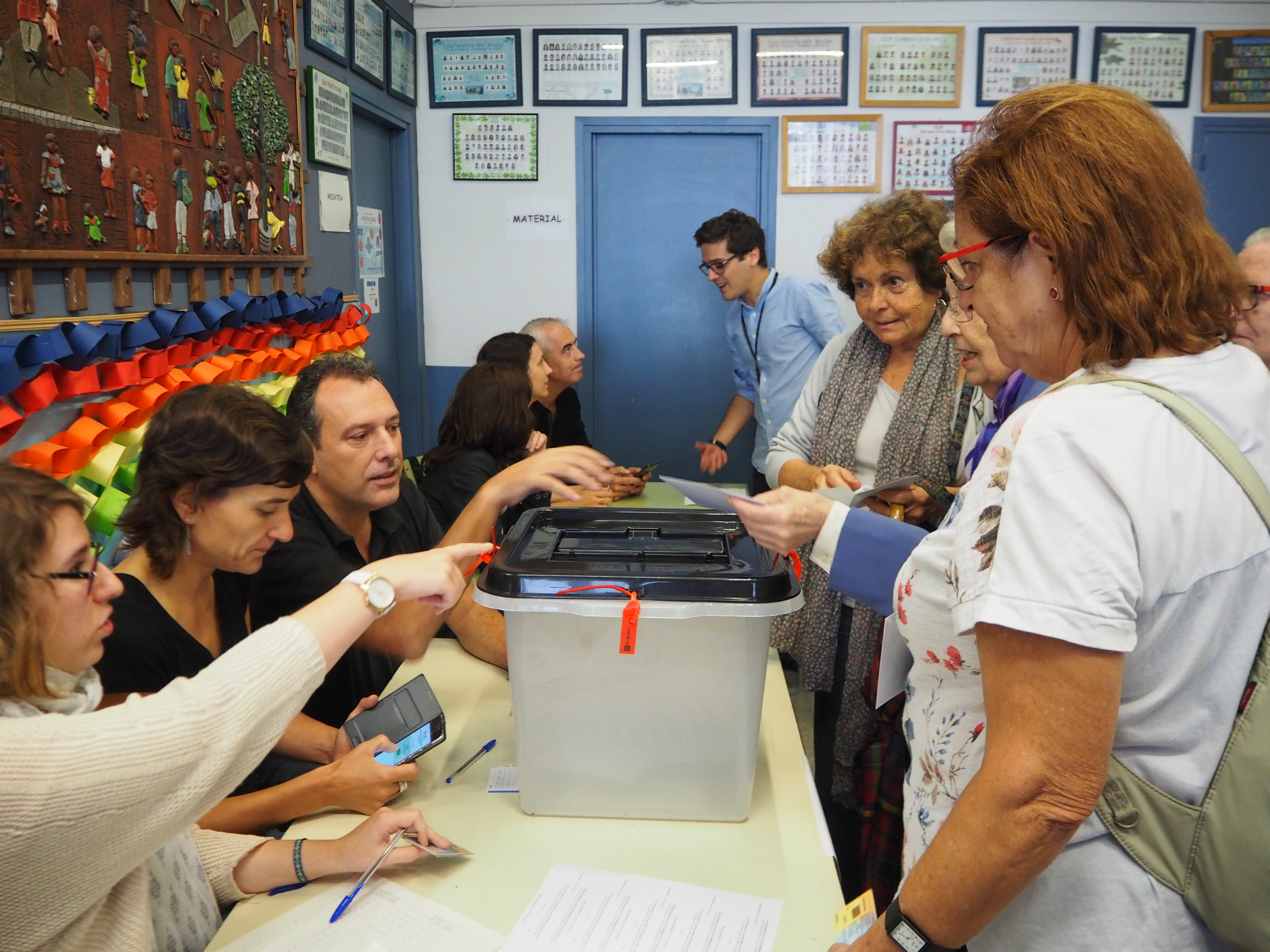 referèndum sobre la independència de Catalunya (oficialment Referèndum d'Autodeterminació de Catalunya, conegut pel numerònim 1-O). Wikipedia: Catalan independence referendum, 2017 See also category: Catalan independence referendum, 2017.